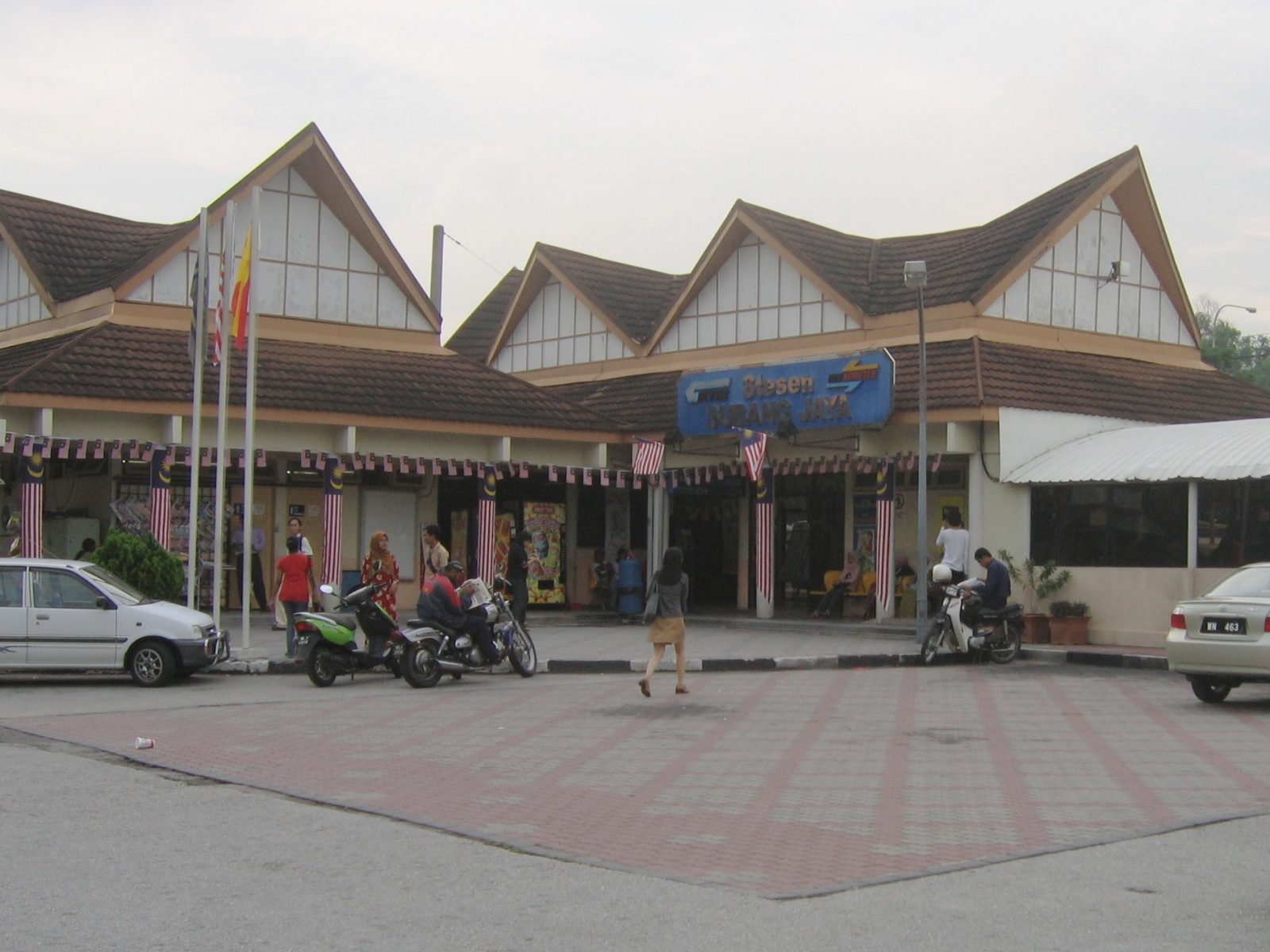 Subang Jaya KTM Komuter train station, Subang Jaya, Selangor, Malaysia.